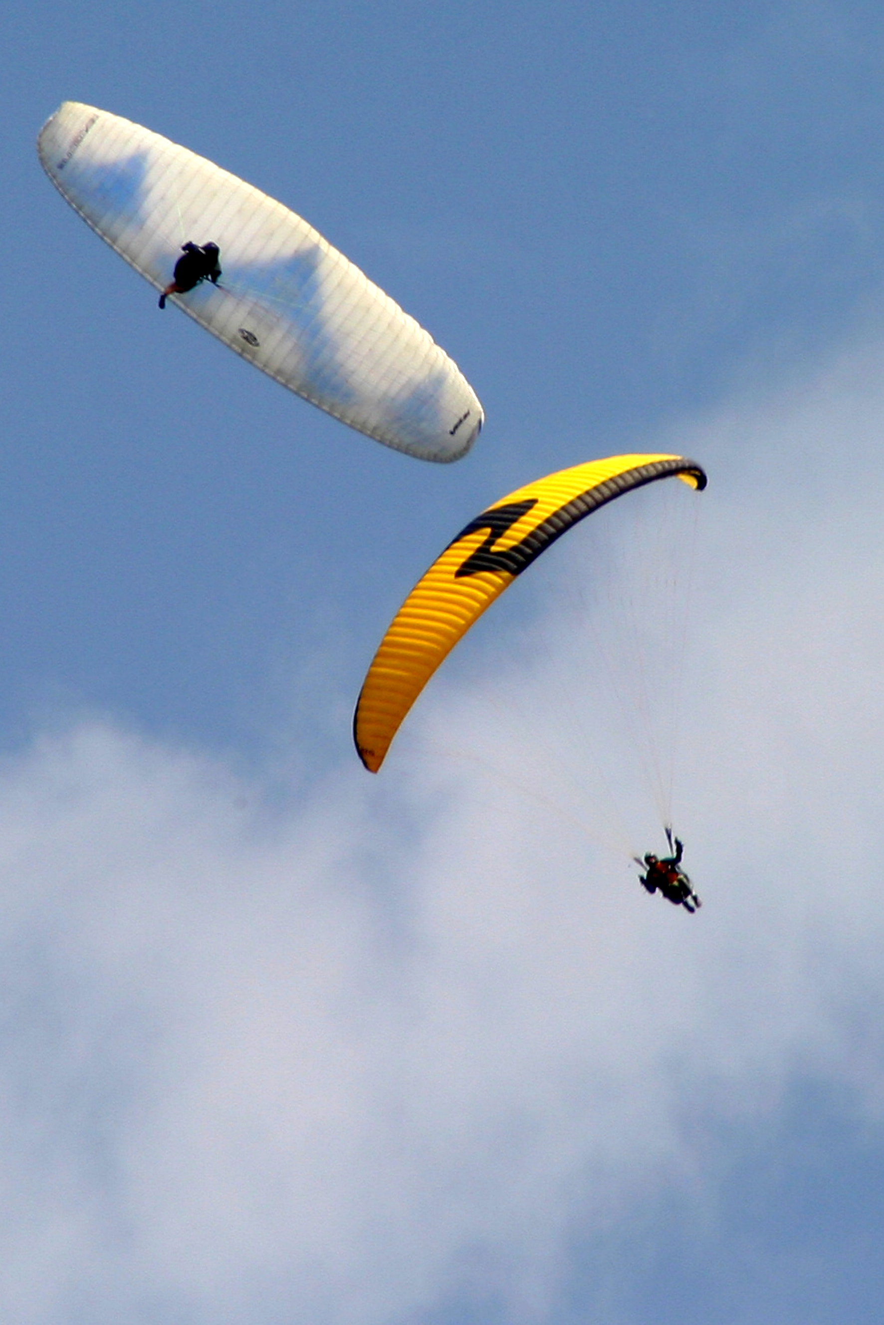 Spirale synchro, figure de votige de parapente réalisée lors de l'Acrolac 2007.